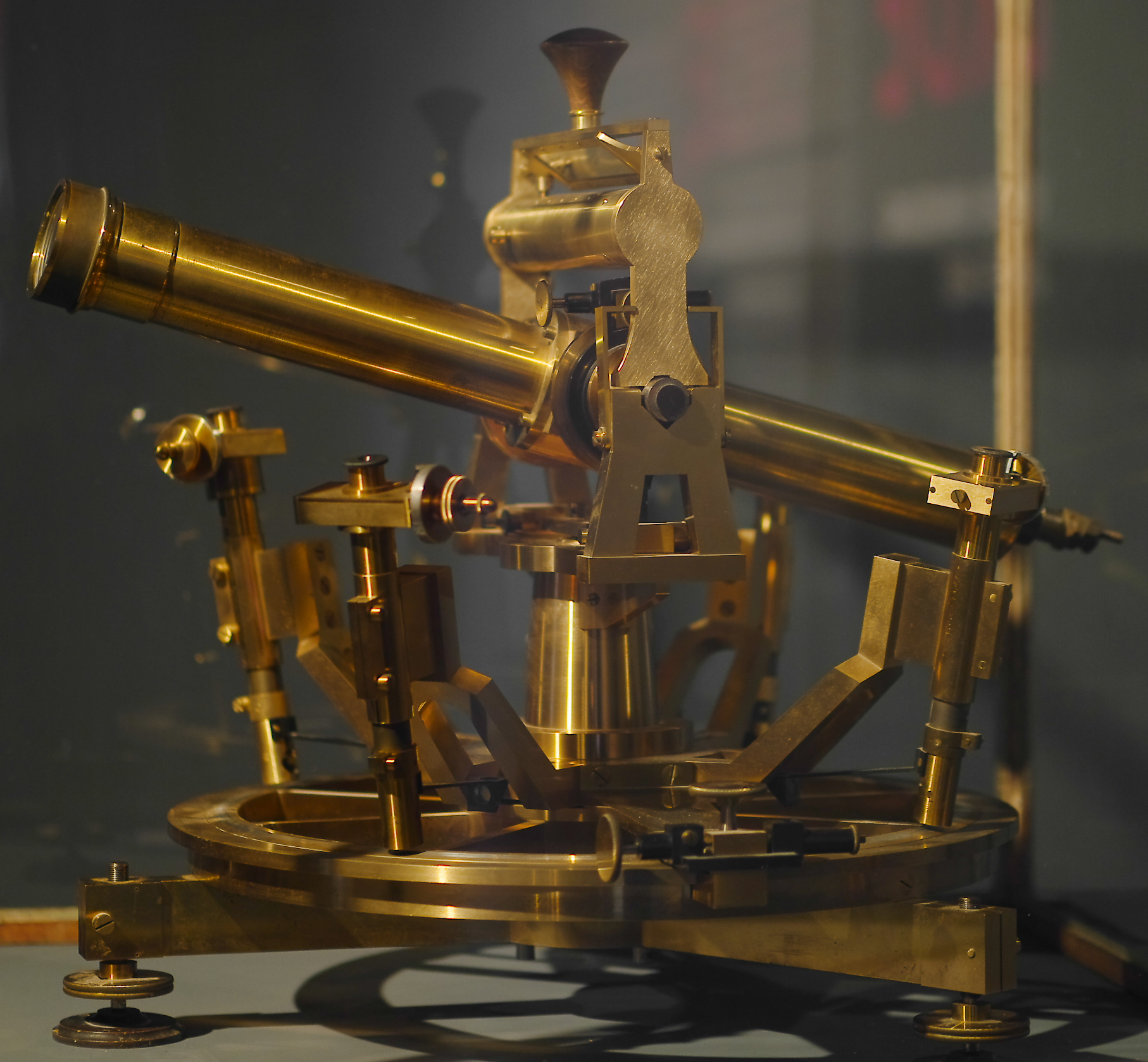 Präzisionstheodolit des Herstellers Gebrüder Brunner (Paris, 1886), Exponat der Ausstellung 2017 vom GeoForschungsZentrum Potsdam